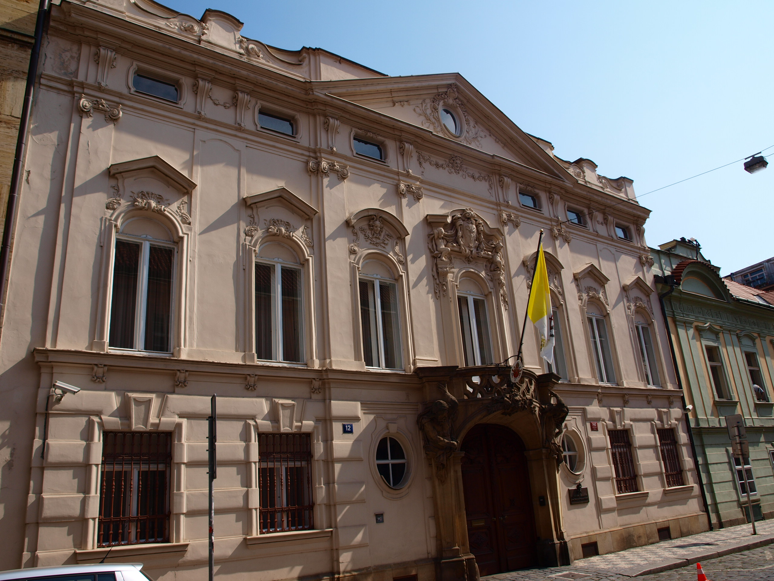 Ditrichštejnský palác Praha